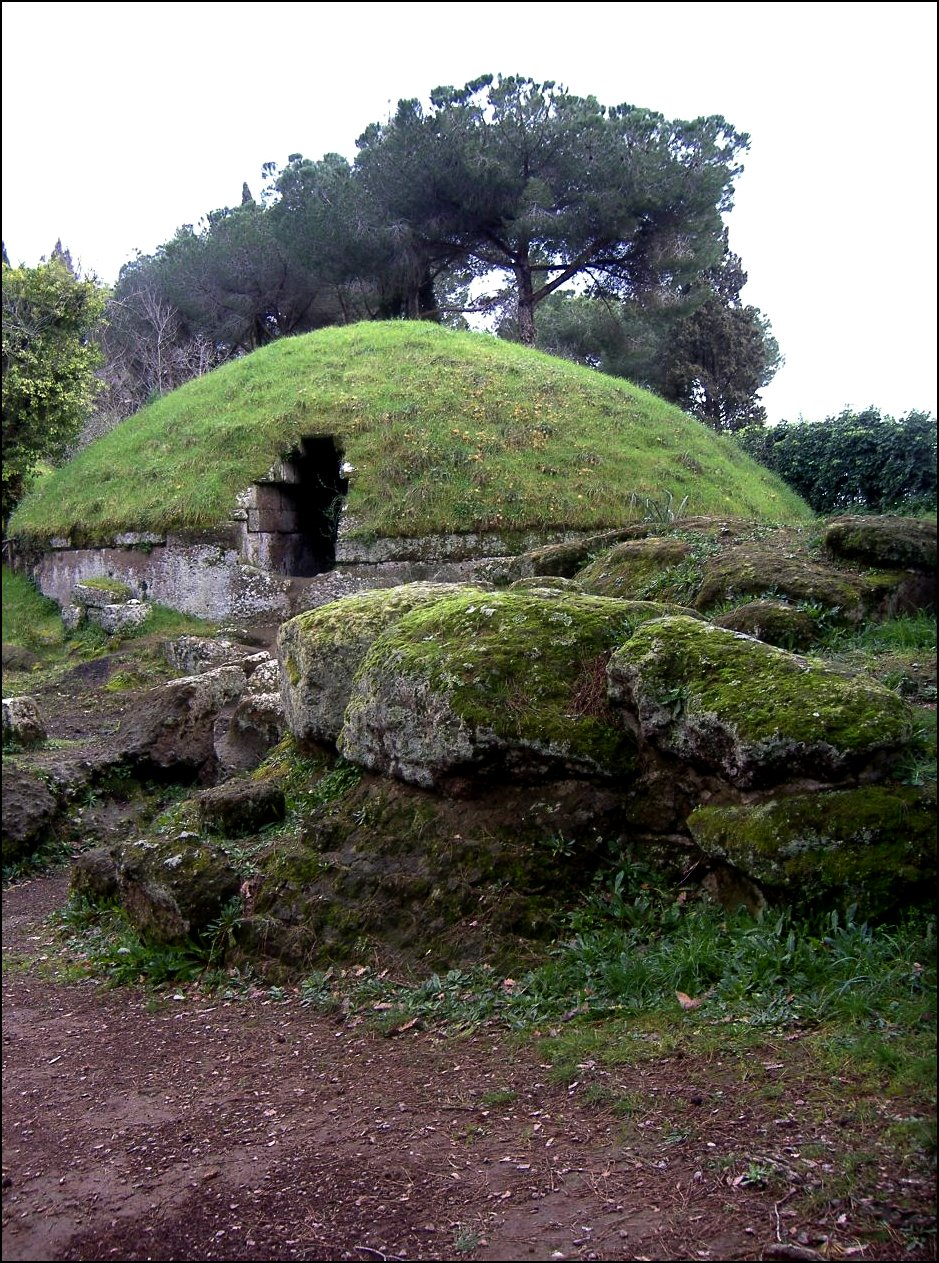 Etruscan tomb